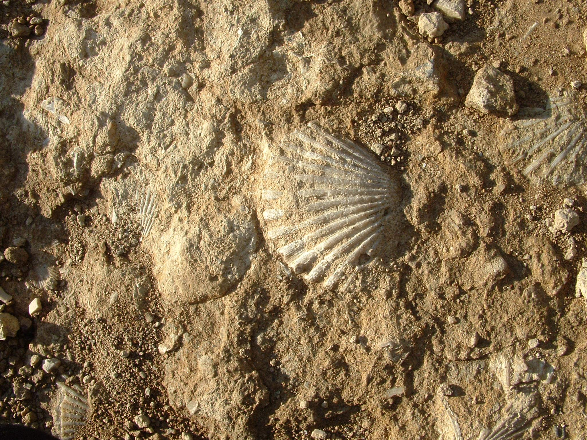 Fossiles du miocène en place à Céreste, Alpes de Haute Provence